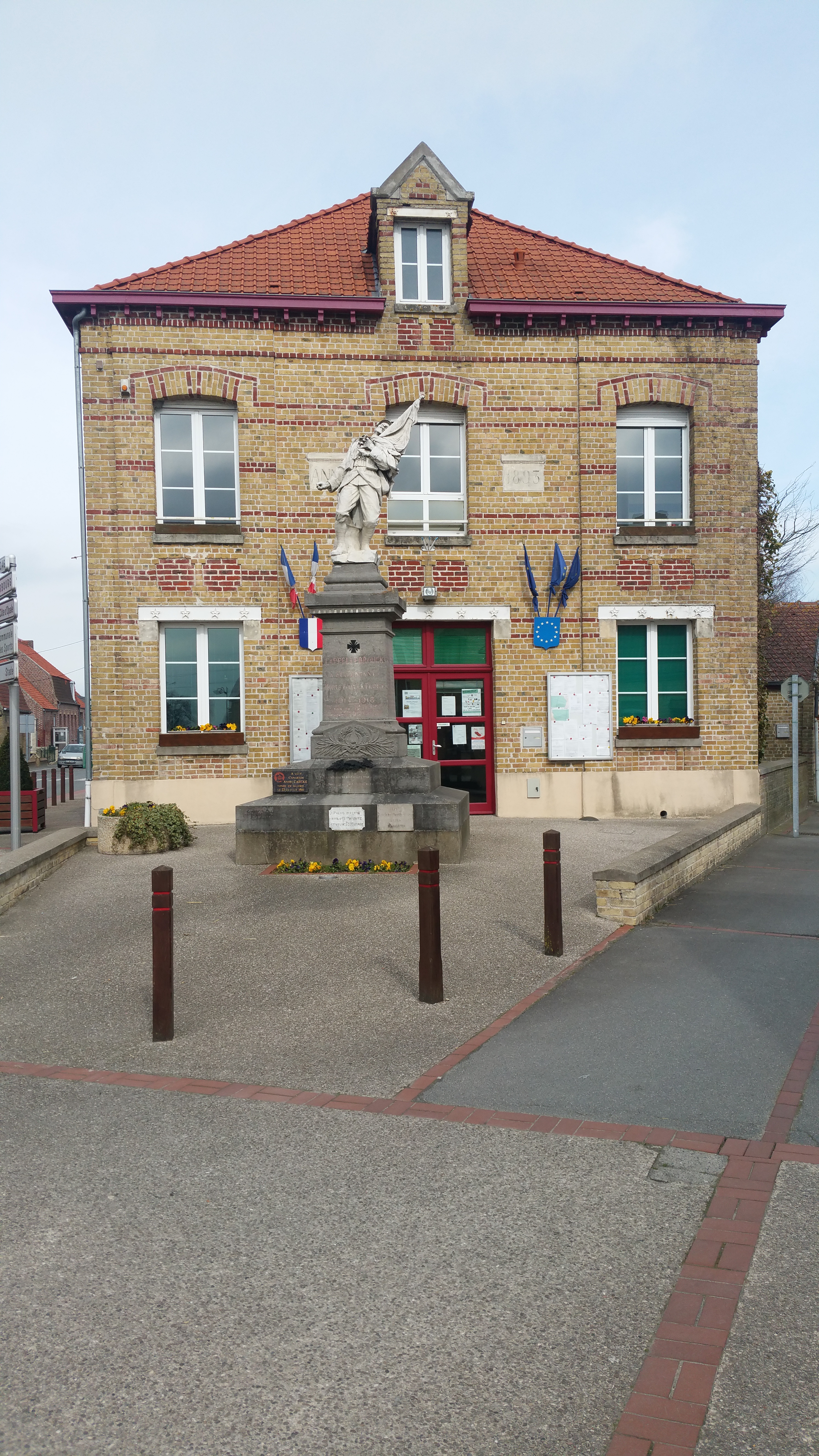 Vue de la mairie de Cappelle-Brouck.